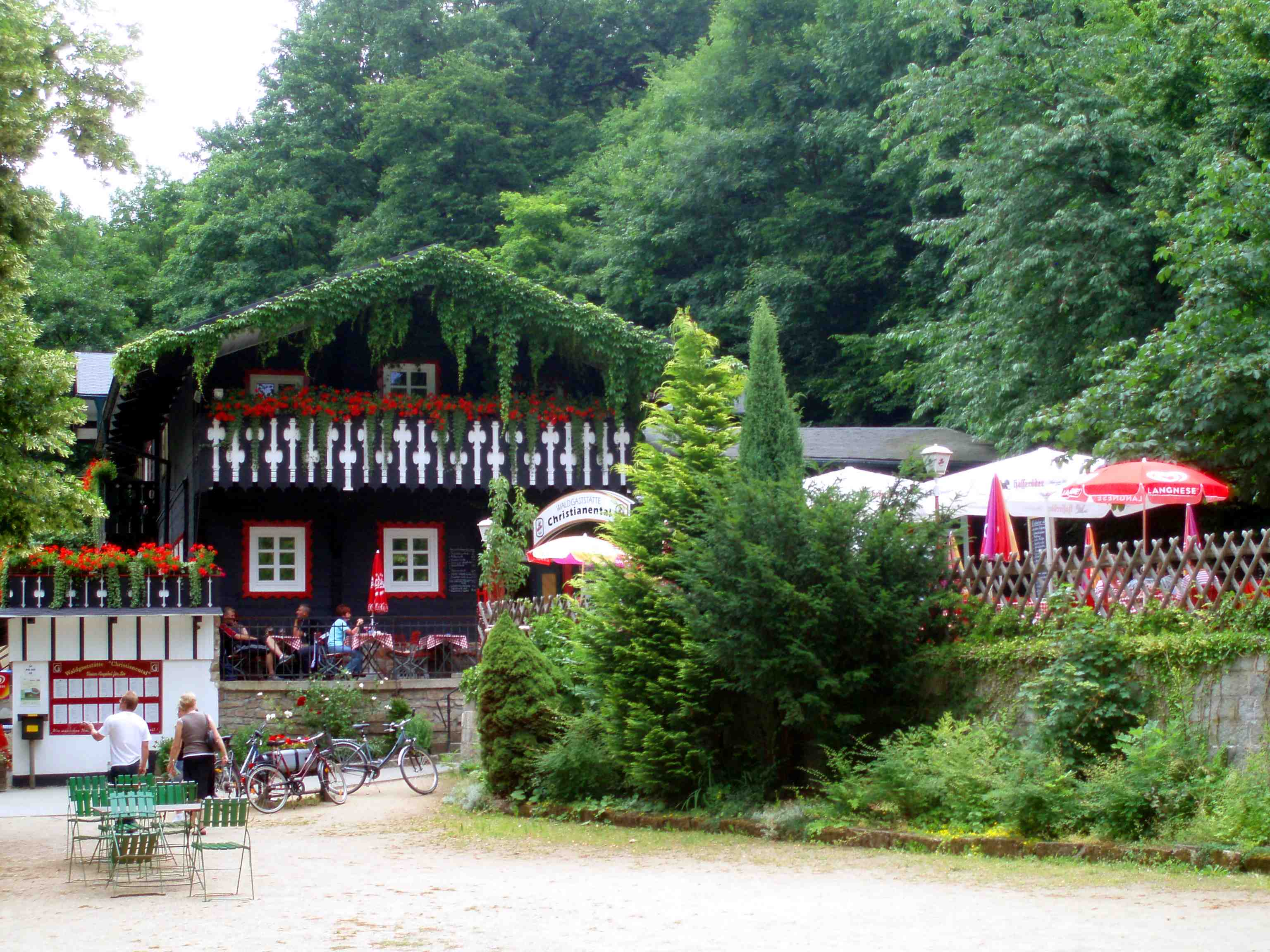 Waldgaststätte Christianental